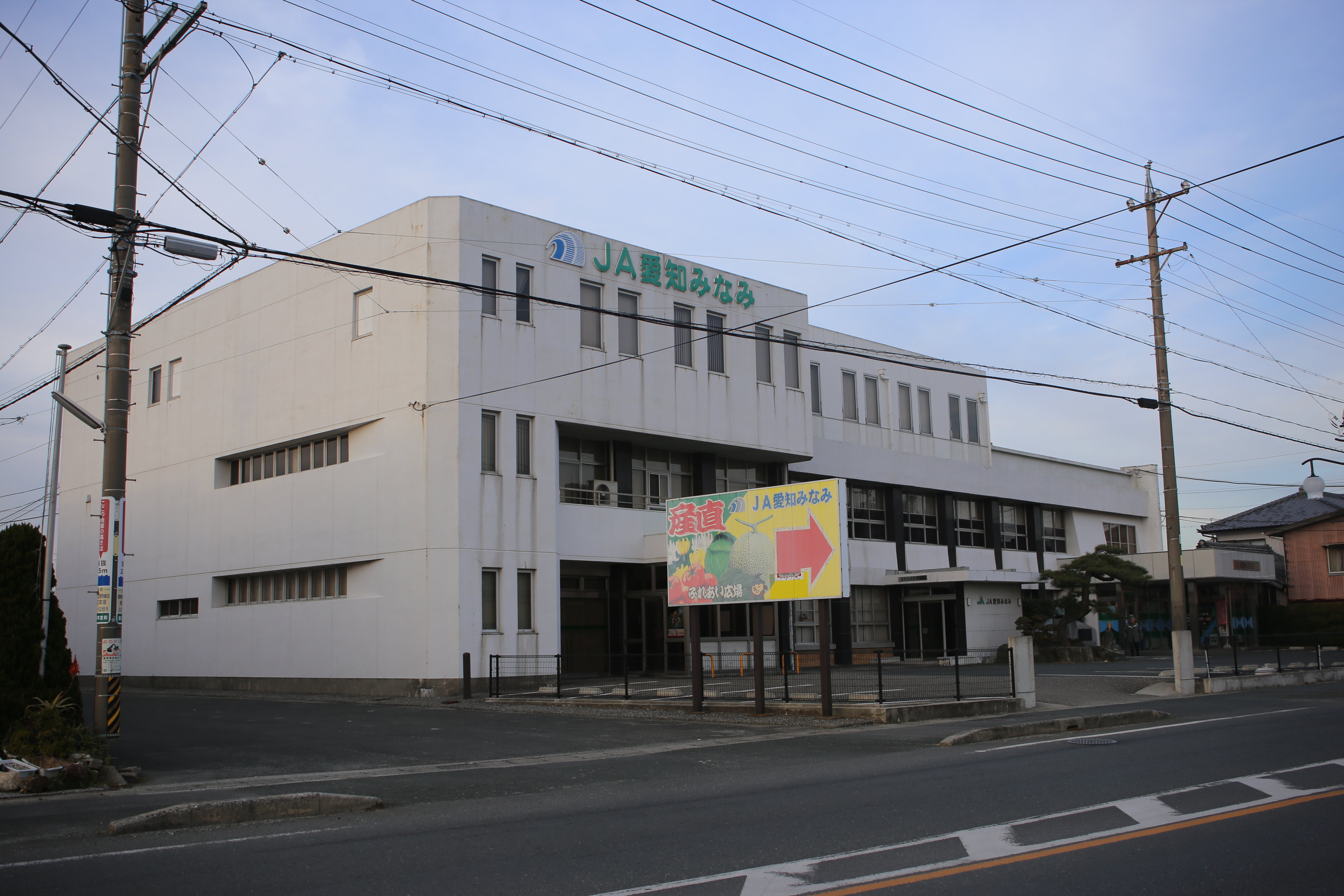 愛知県田原市福江町の愛知みなみ農業協同組合（JA愛知みなみ）本店